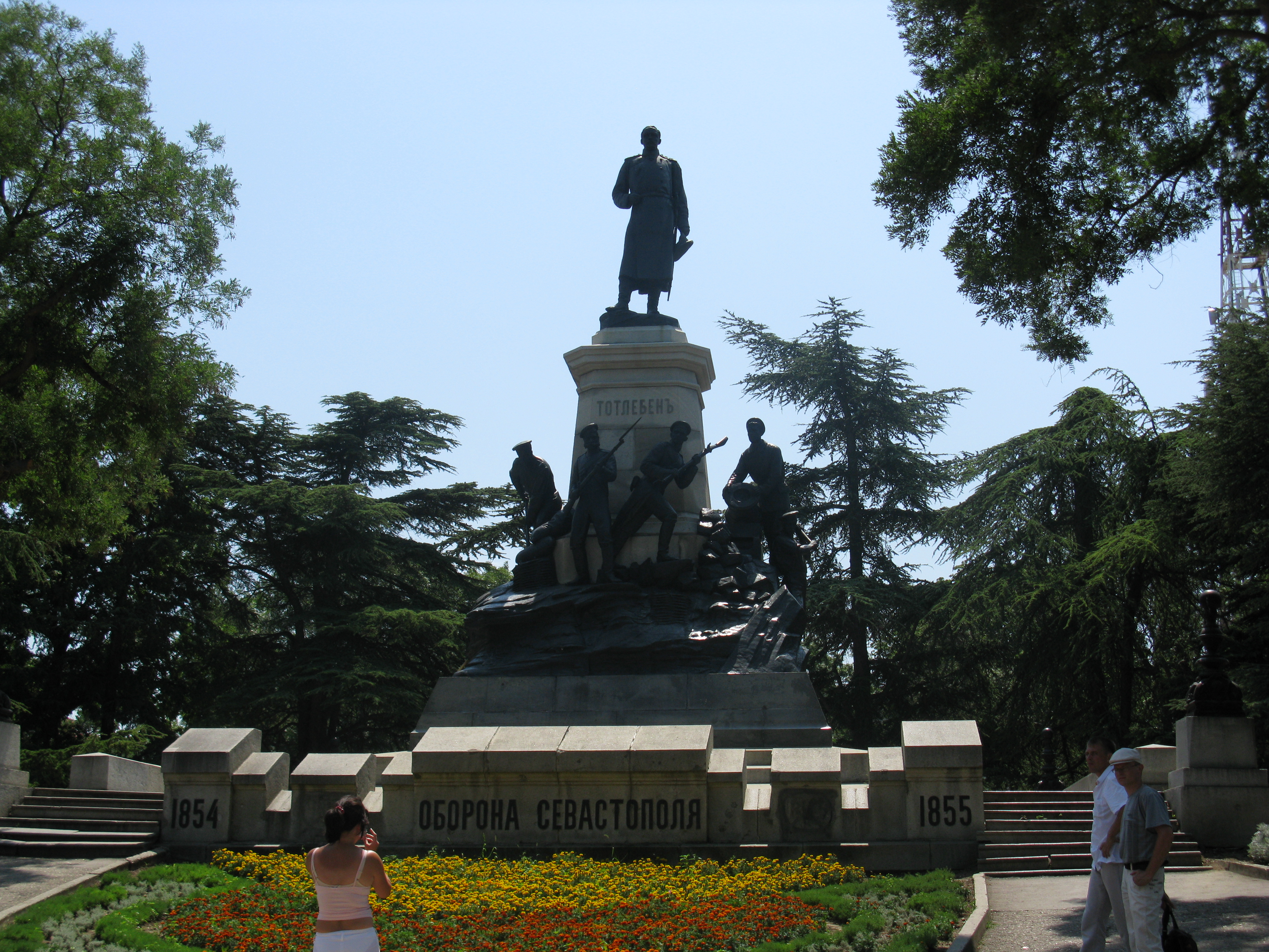 Памятник Э.И. Тотлебену: бульвар Исторический, Ленинский район, Севастополь This object is located on the Crimean Peninsula and recognized as cultural heritage by both Russia and Ukraine under the monument ID: 9230108002/ 85-002-0004, respectively. The legal status of the Crimean region is currently disputed.